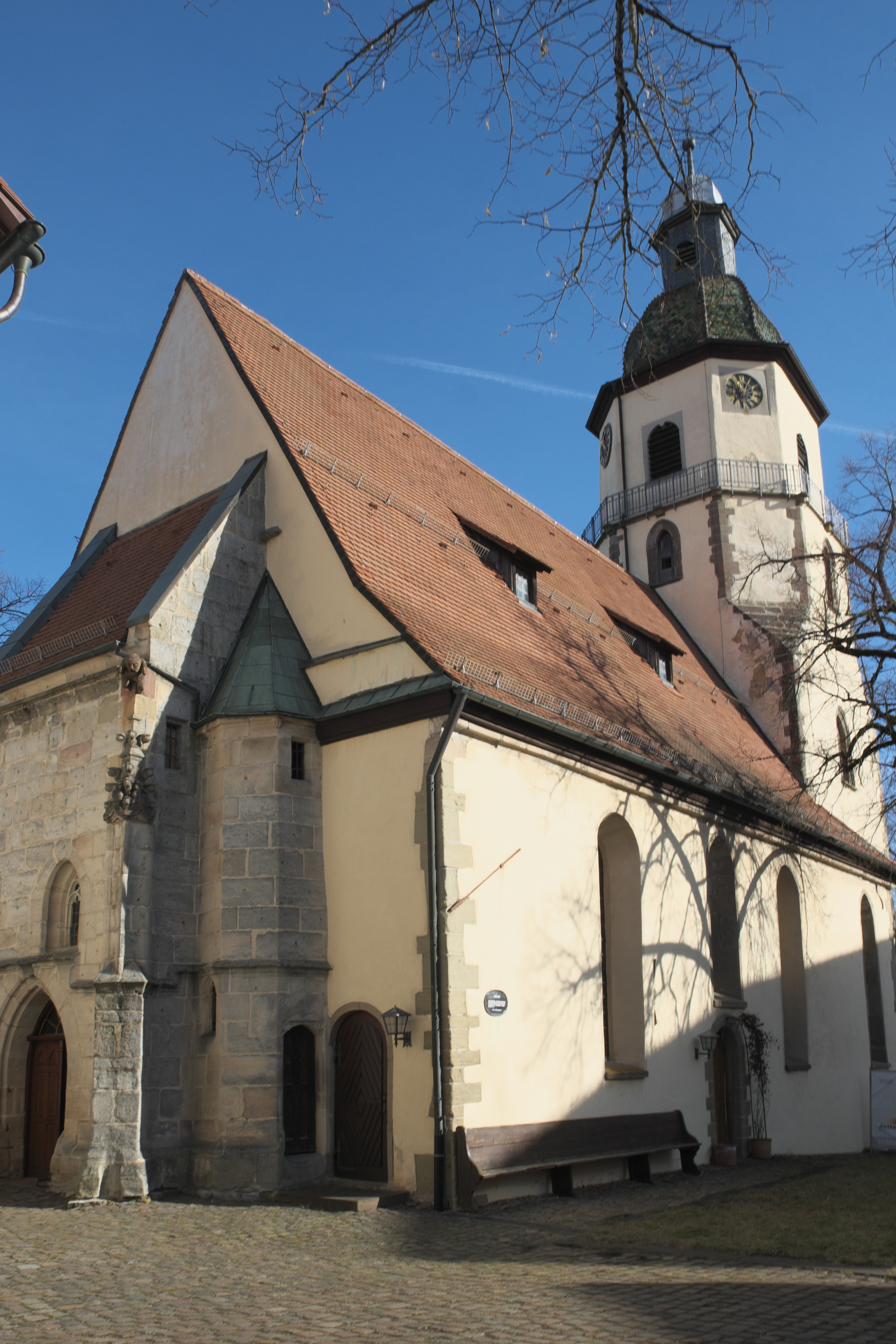 Evangelische Stadtkirche in Rosenfeld im Zollernalbkreis (Baden-Württemberg/Deutschland)